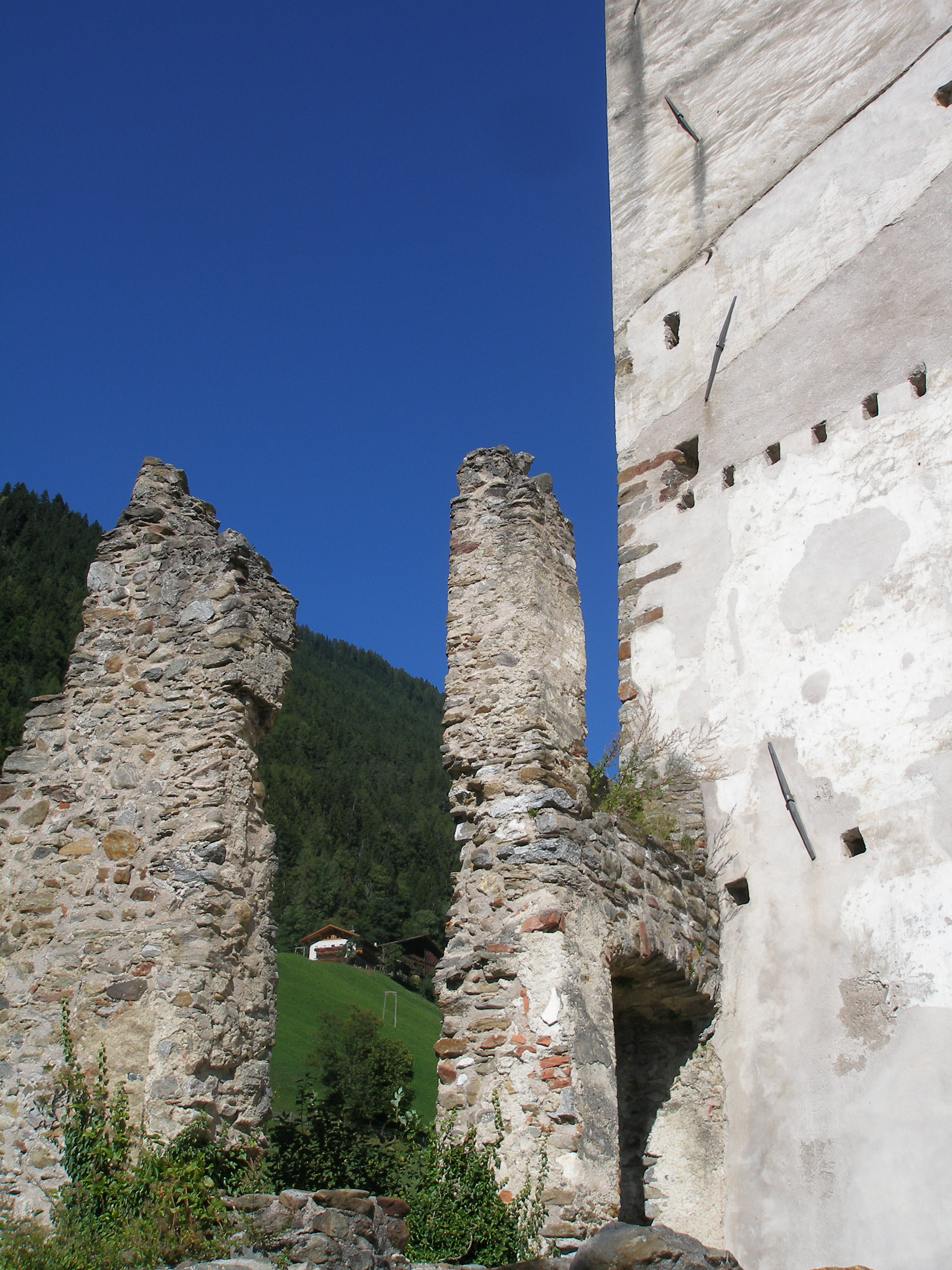 Jaufenburg bei St. Leonhard in Passeier